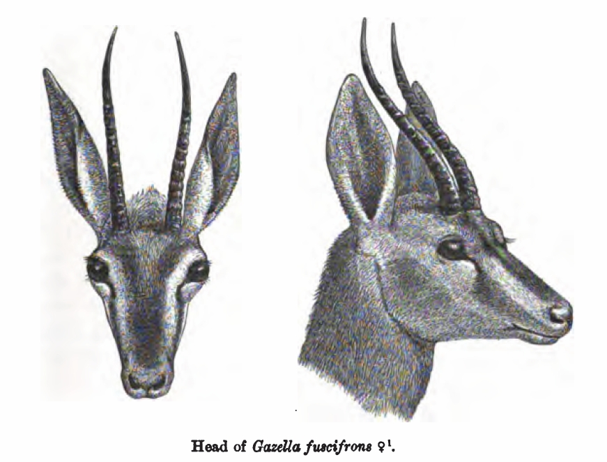 Gazella bennetti fuscifrons (Baluch Chinkara)